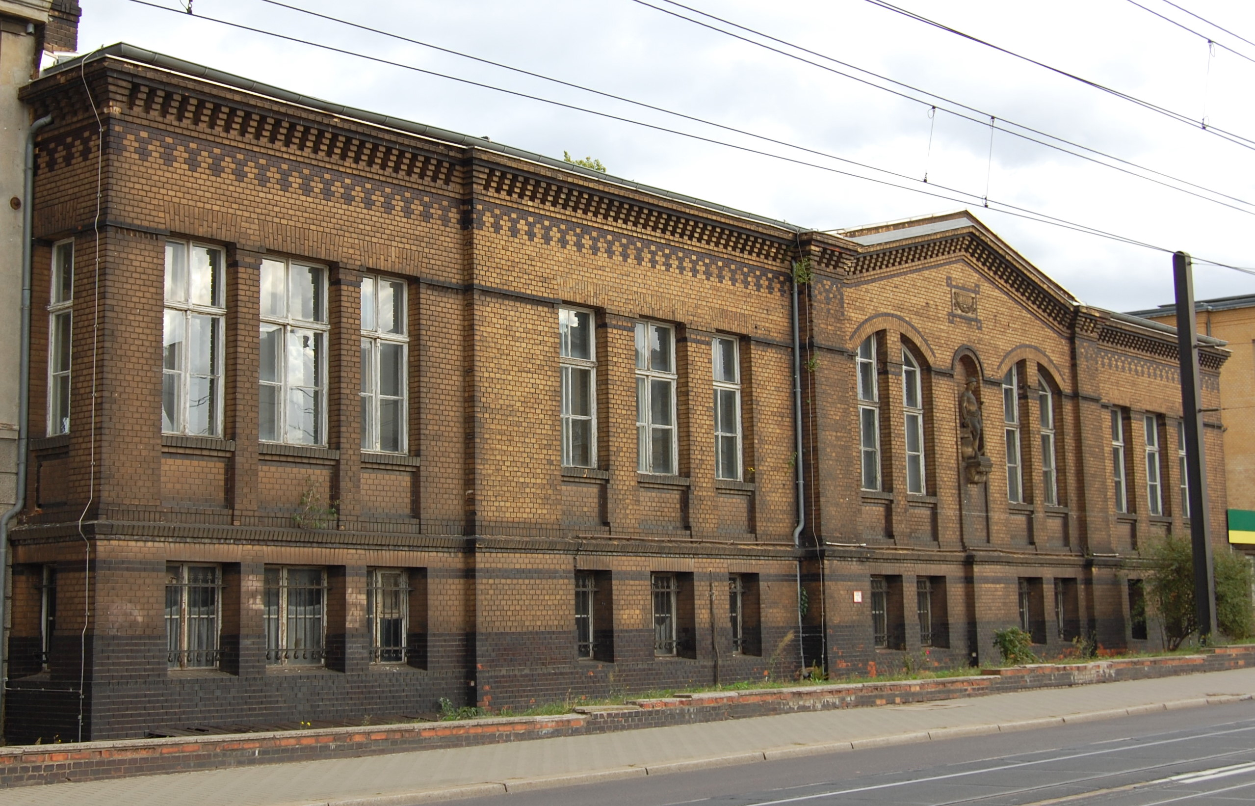 Verwaltungsgebäude von Fahlberg-List, nördlich des Haupteingangs